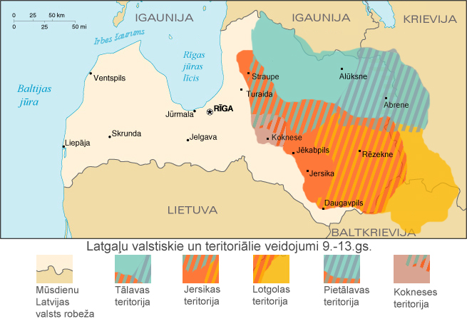 Latgaļu valstiskie un teritorialie veodojumi 9.-13.gs. pēc dažādām vēstures kartēm.